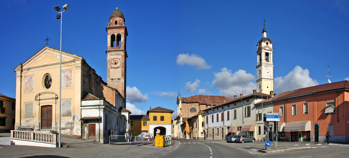 Panoramica di San Giorgio di Lomellina (PV) con la chiesa di San Rocco ed il campanile della parrocchiale